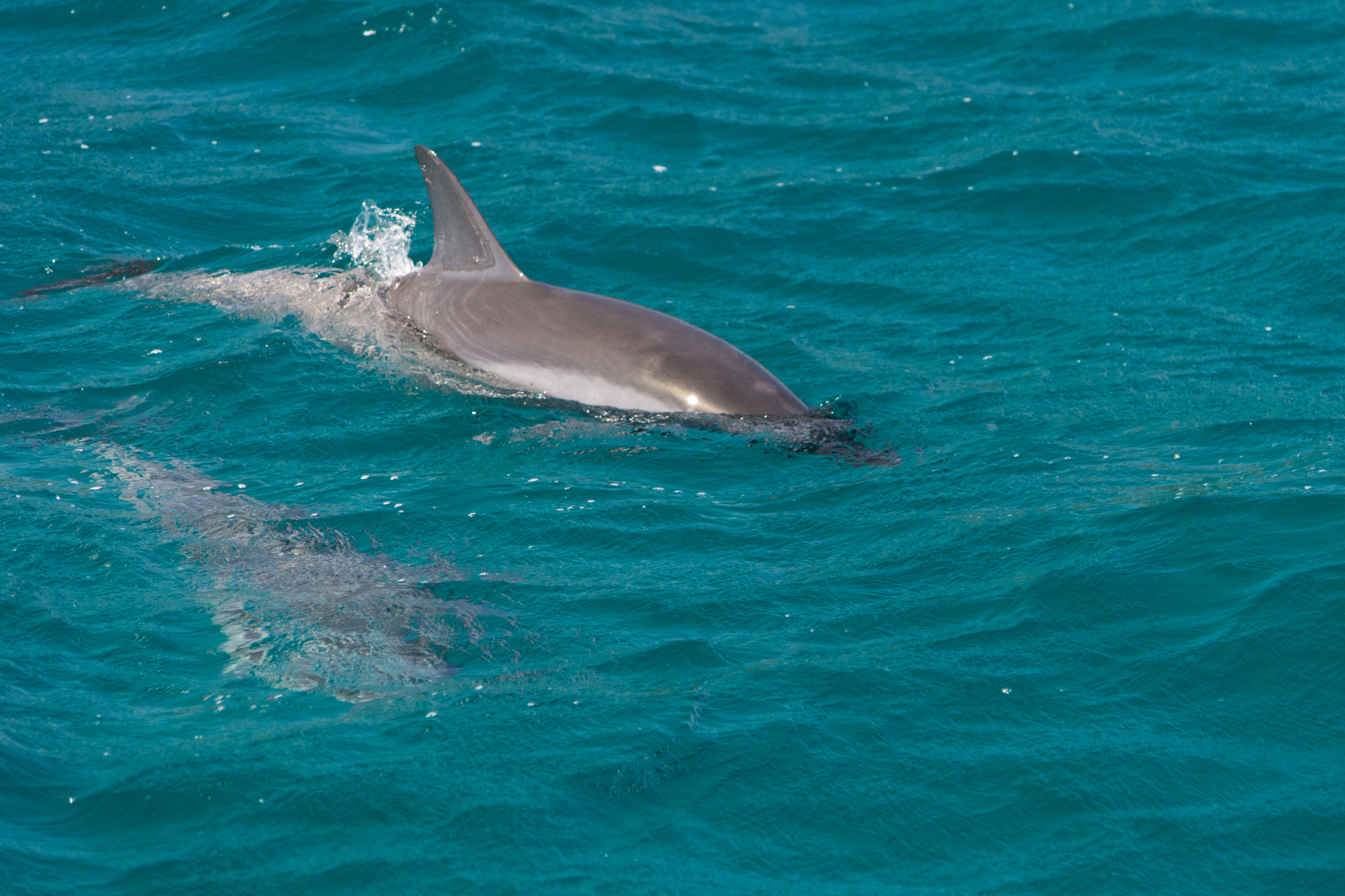 Baia dos Golfinhos